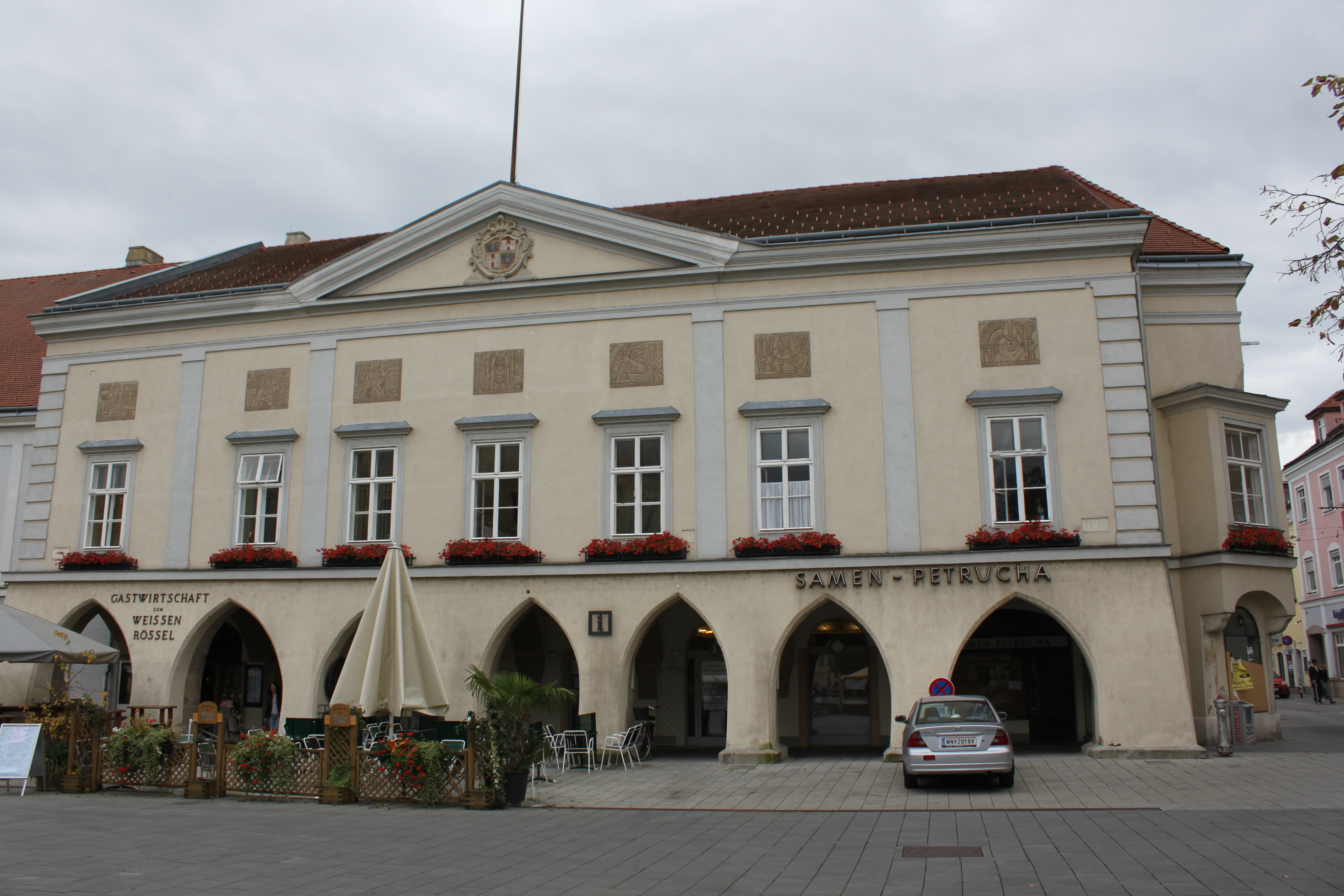 Zum weißen Rössl (Wiener Neustadt)